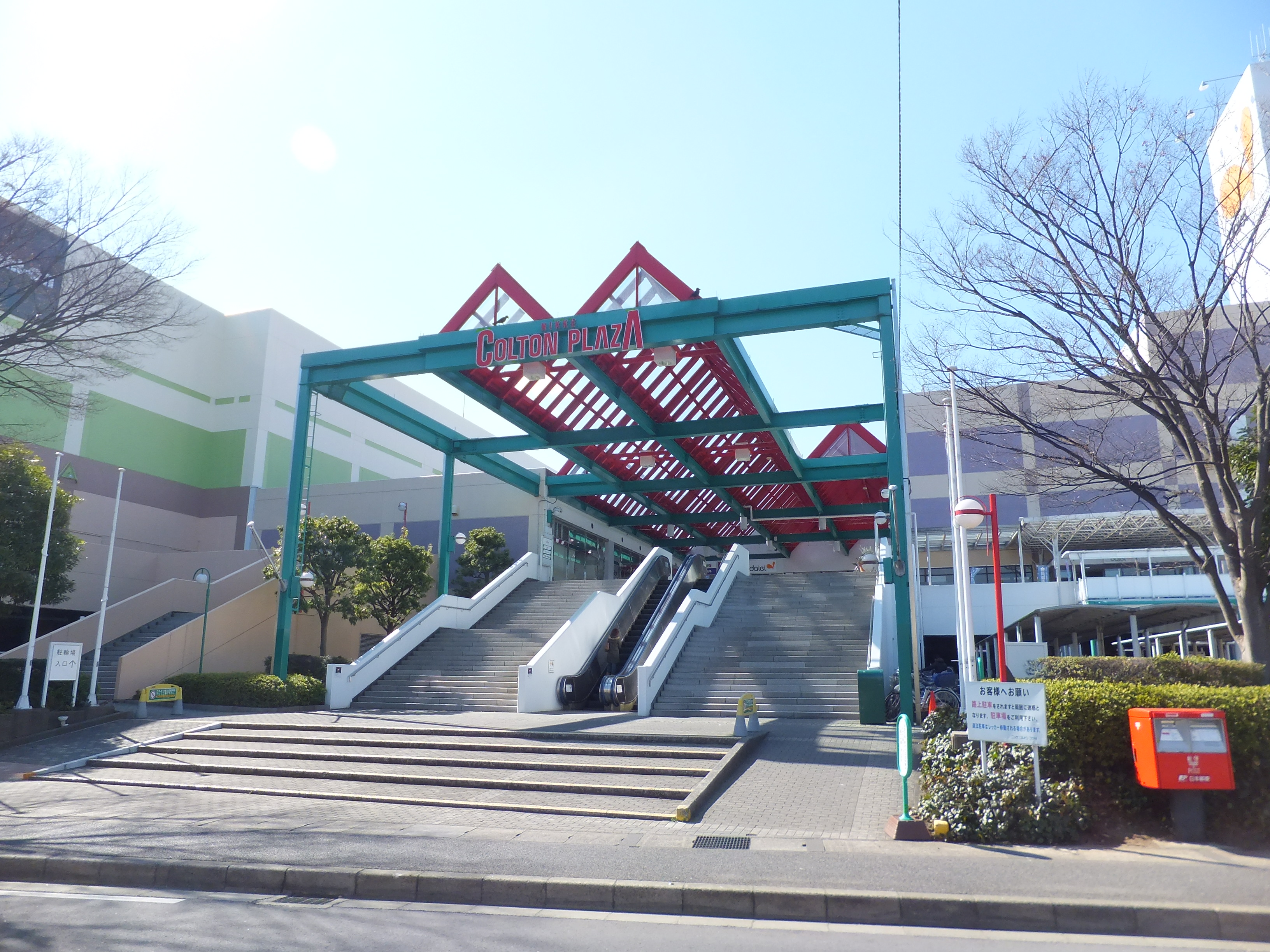 ニッケコルトンプラザ東入口